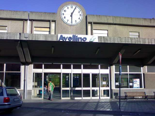 Stazione ferroviaria di Avellino